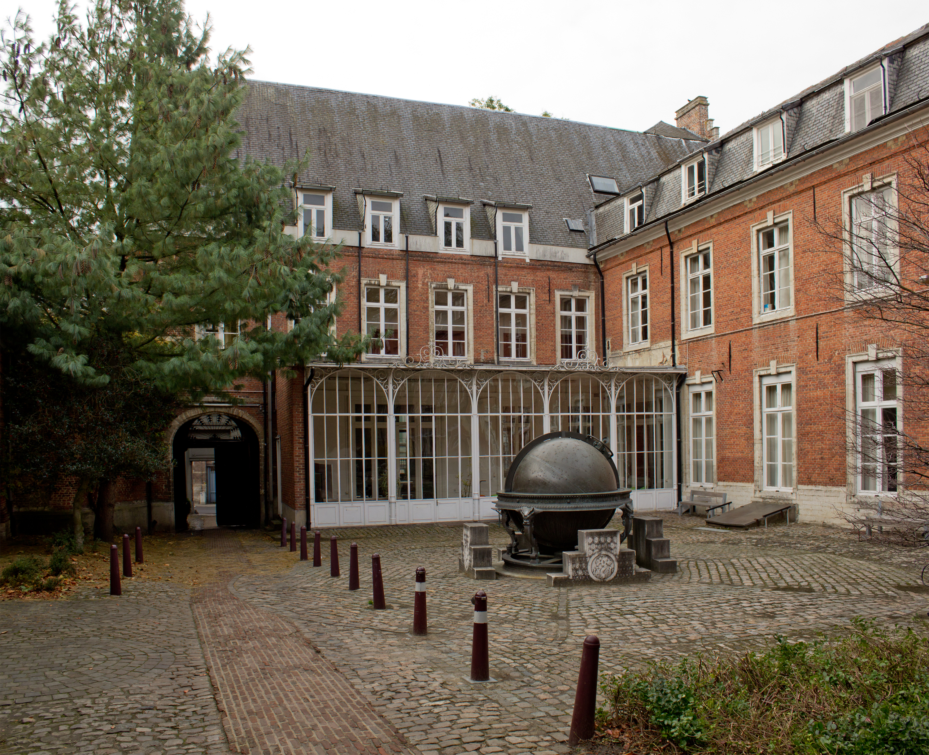 Atrechtcollege, Leuven